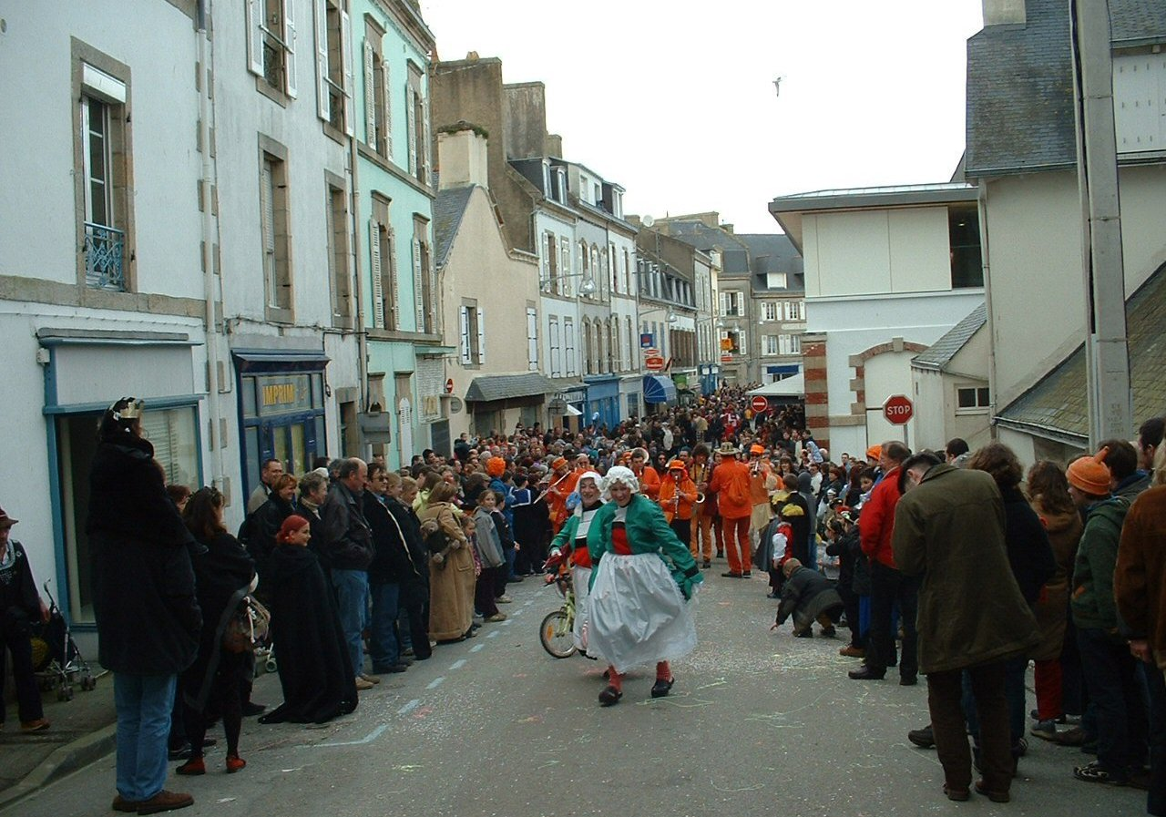 Douarnenez - Défilé des Gras (carnaval)